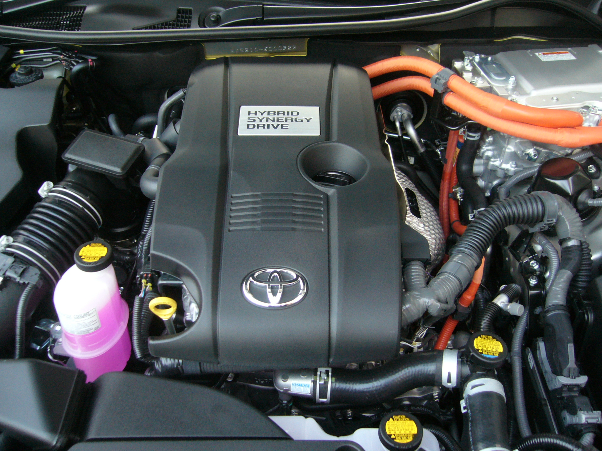 トヨタ・ARエンジン